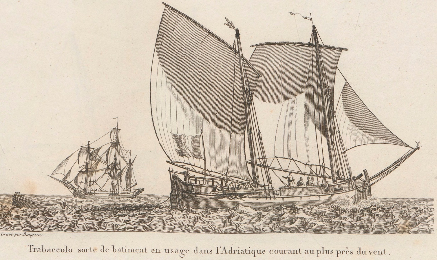 Trabaccolo, sorte de bâtiment en usage dans l’Adriatique, courant au plus près du vent. « Ce sont des caboteurs de l’Adriatique. Comme cette mer est remplie de bas-fonds, ils sont construits à plate varangue et tirent peu d’eau » (Jean-Jérôme Baugean). Gravure publiée en 1826 dans la Collection de toutes les espèces de bâtiments de guerre et de bâtiments marchands qui naviguent sur l'Océan et dans la Méditerranée, dessinée d'après nature et gravée par Baugean, mais réalisée avant 1819 (date de la mort de l'auteur).